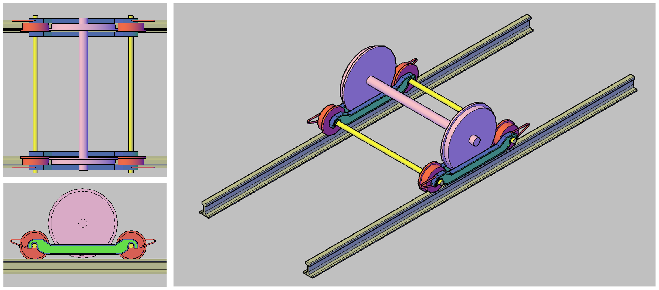 Vista en planta y alzado, y una perspectiva de un patín de ruedas